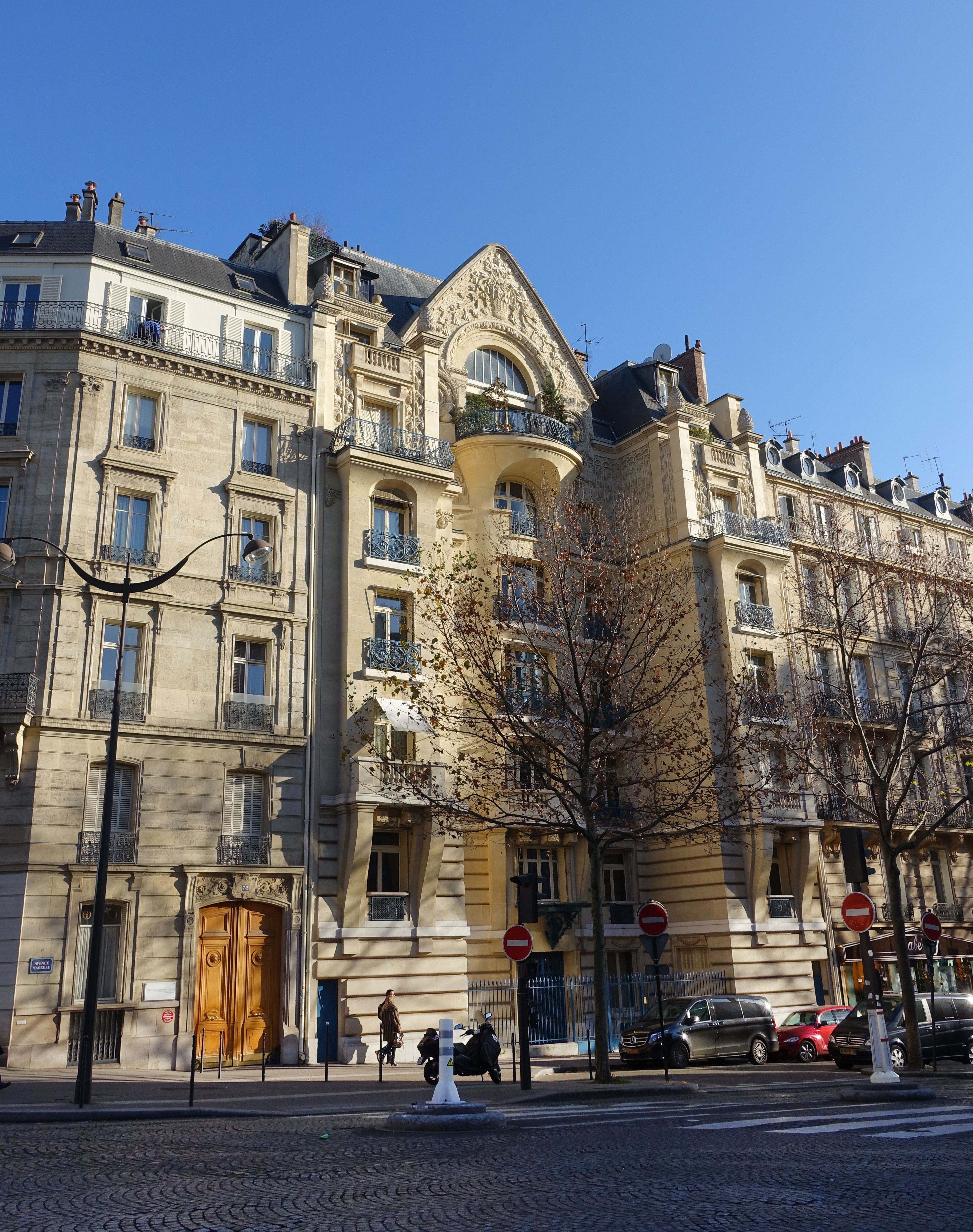 Immeuble 30, avenue Marceau, Paris, France.